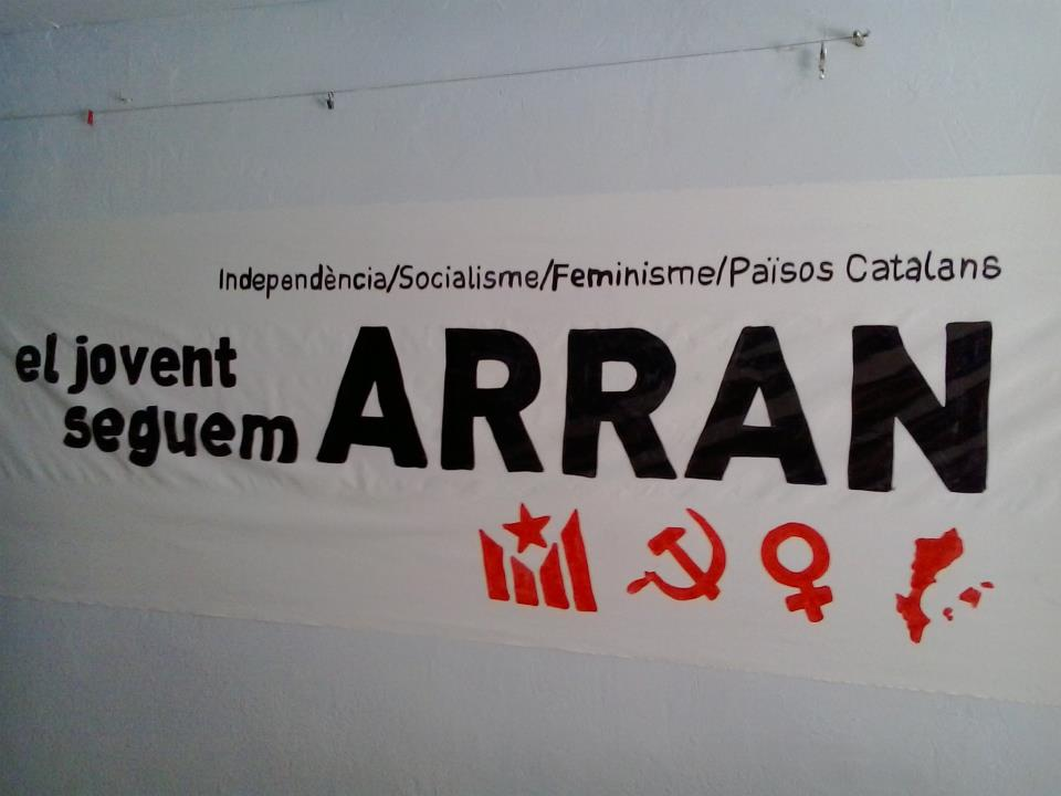 Propaganda of the Catalan youth organization Arran.